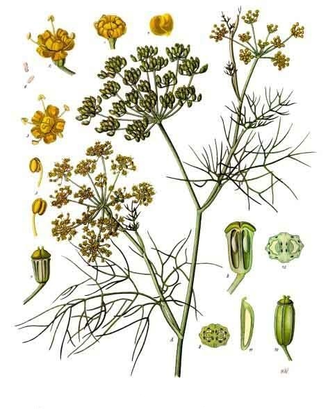 Fenchel. A blühende und fruchtende Pflanze in natürl. Grösse; 1 Blüthenknospe, vergrössert; 2, 3 Blüthe desgl.; 4 Kronblatt, desgl.; 5 Staubgefässe, desgl.; 6 Pollen, desgl.; 7 Stempel, desgl.; 8 derselbe im Längsschnitt, desgl.; 9 derselbe im Querschnitt, desgl.; 10 Frucht, desgl.; 11 Theilfrucht, desgl.; 12 Frucht im Querschnitt, desgl.